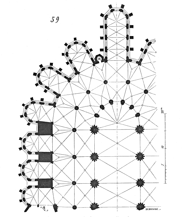 Plan du chœur de la cathédrale du Mans.